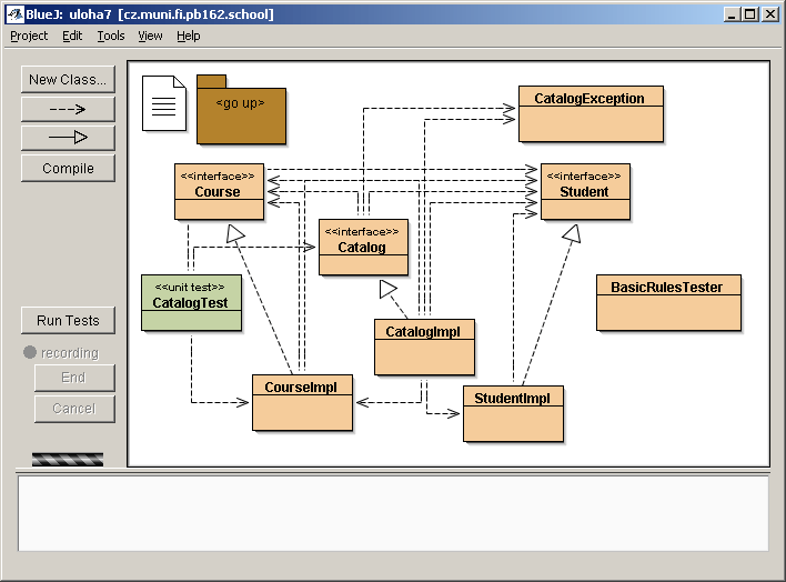 Ukázka pracovního prostředí BlueJ